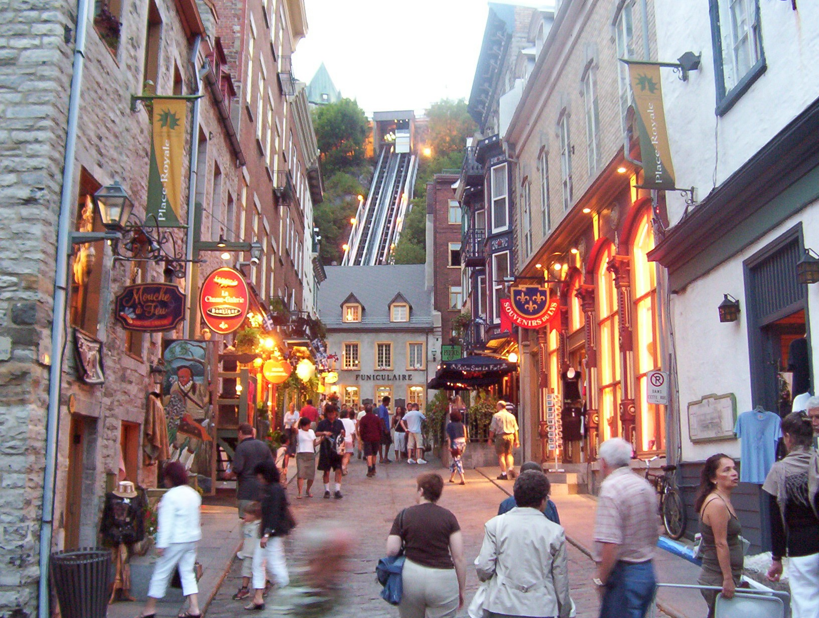 J'ai beaucoup aimé votre pays, peut etre parce que je trouvé dans le Quebec une nostalgie de l'Europe et sur tout de la France: par exemple dans la ville de Quebec il y a la place Royale avec le buste de Luis XIV. Mais dans le Canada il y a aussi des grands espaces que nous, en Europe, ne connaissons pas. En outre, en regardant la TV du Quebec, j'ai apprécié une differance de sensibilité entre le Quebec et les USA. Au revoir!